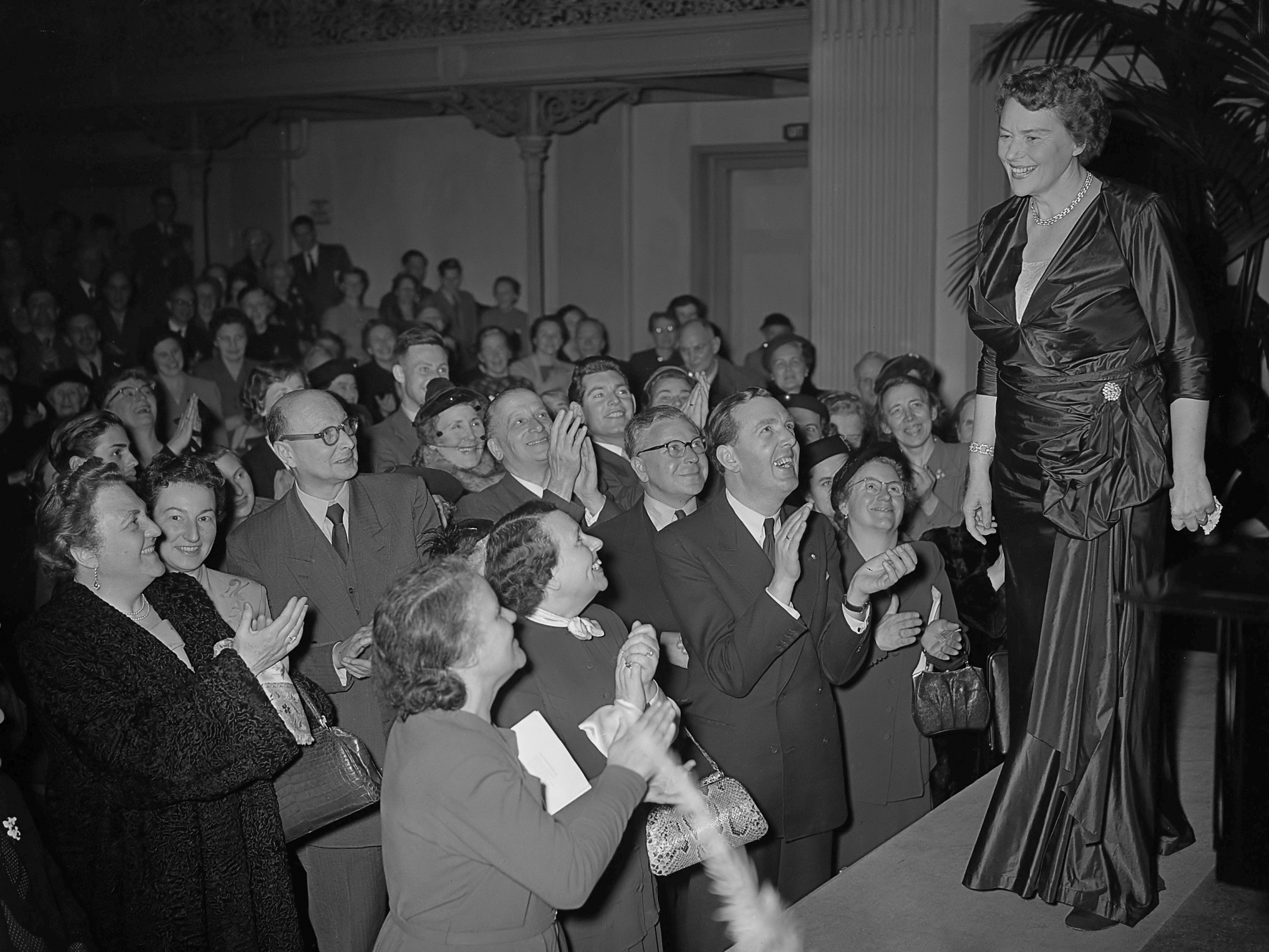 Afscheidsconcert Jo Vincent, Diligentia (Den Haag NL), 27 december 1953